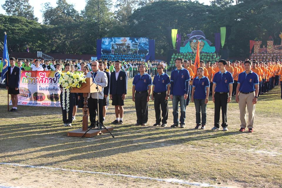 กรีฑาสี 60 ส.ว.